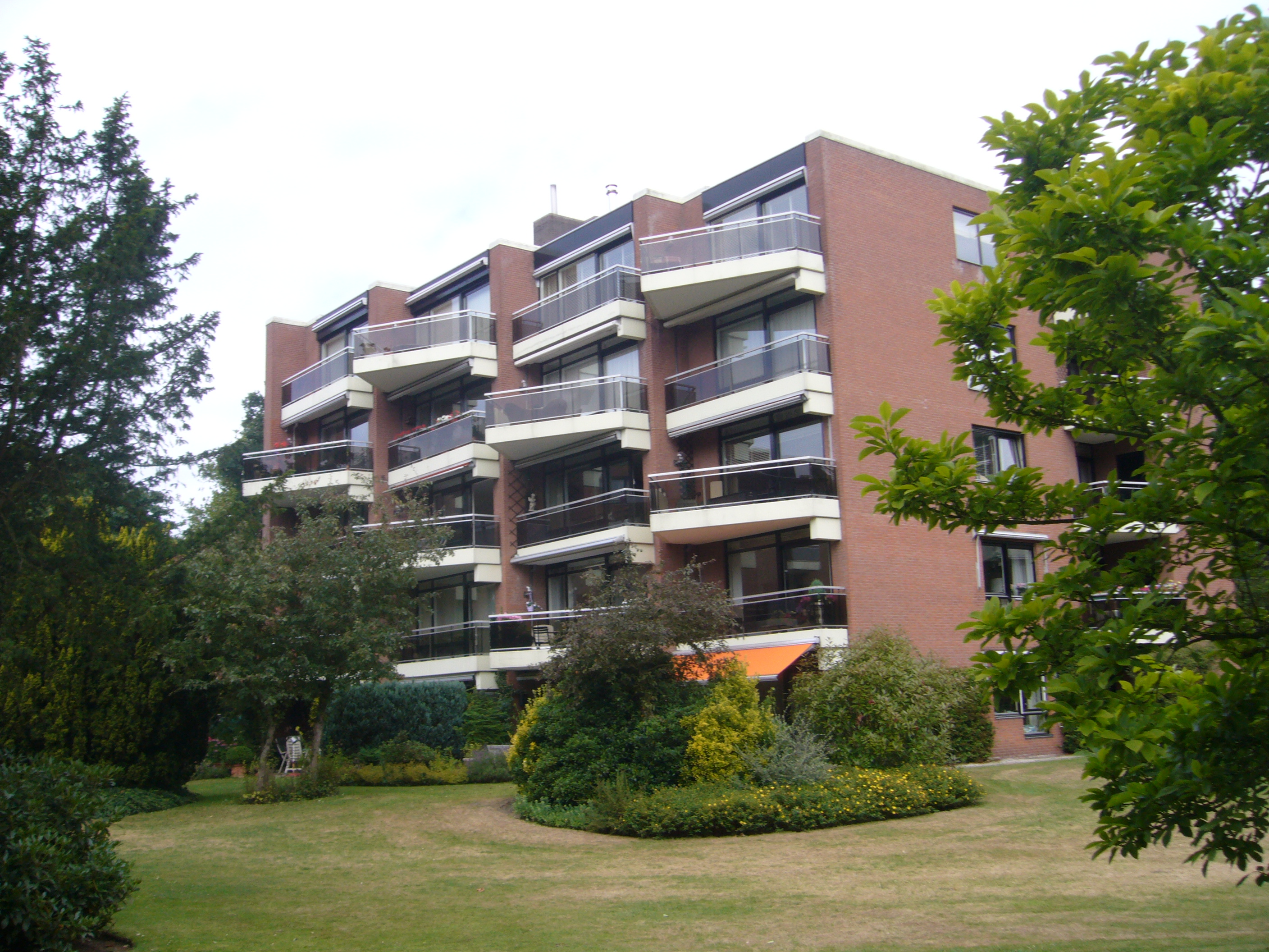 Kasteel Oud-Wassenaar, appartementen op het landgoed